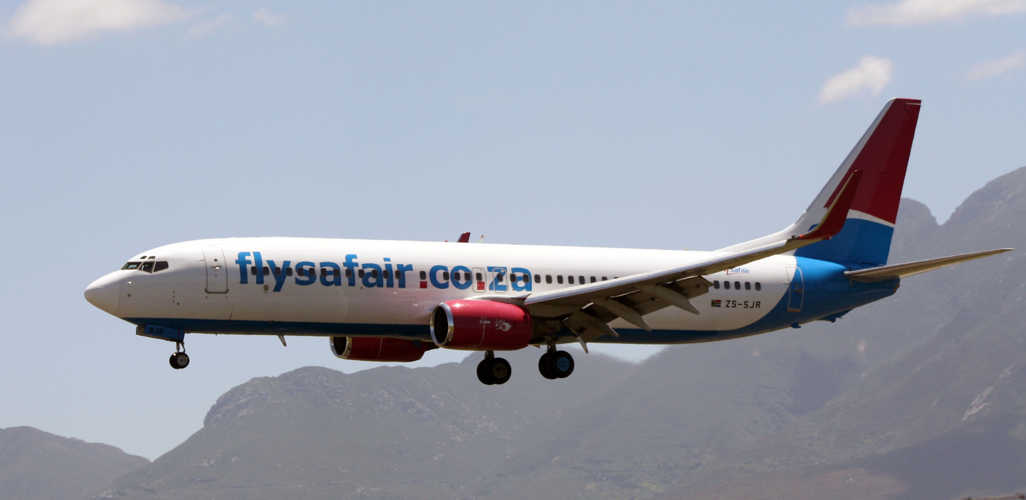 FlySafair B737-844 ZS-SJR